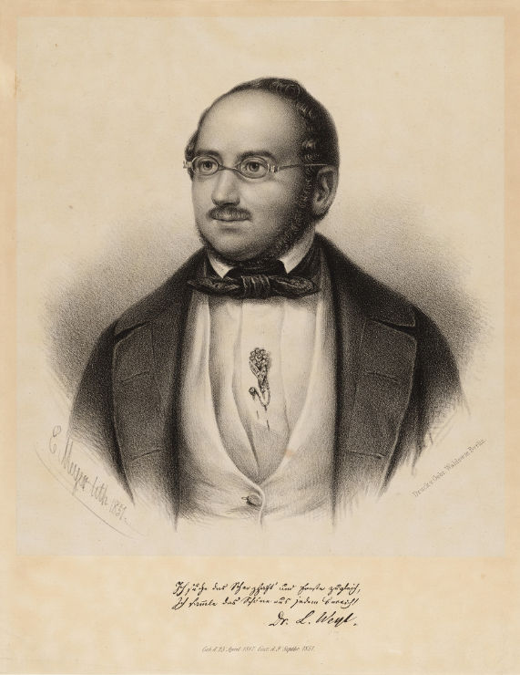 Porträt Louis Weyl (1815 - 1851) Schriftsteller, Philosoph, Buchhändler und Humorist